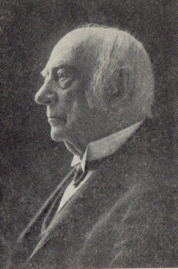 晩年のジェームス・カーティス・ヘボン